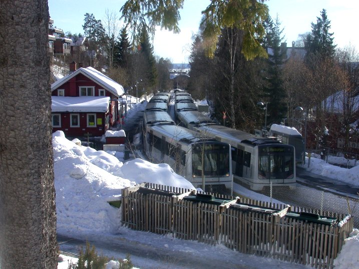 To seksvogners Mx-tog møtes ved Vettakollen under ski-VM i Holmenkollen.